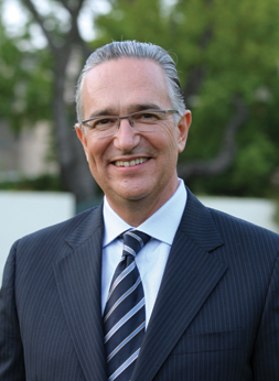 Ricardo Salinas Pliego, fundador de TV Azteca, en Los Ángeles en algún año.